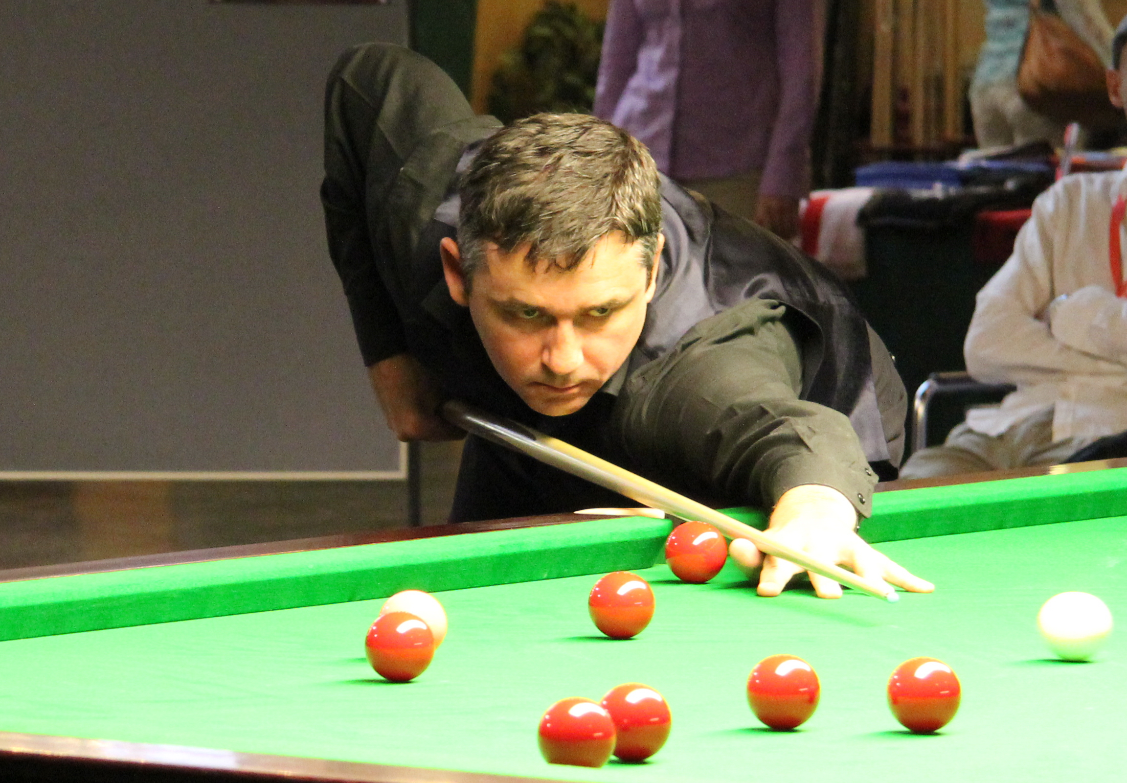 Alan McManus beim Paul Hunter Classic 2011